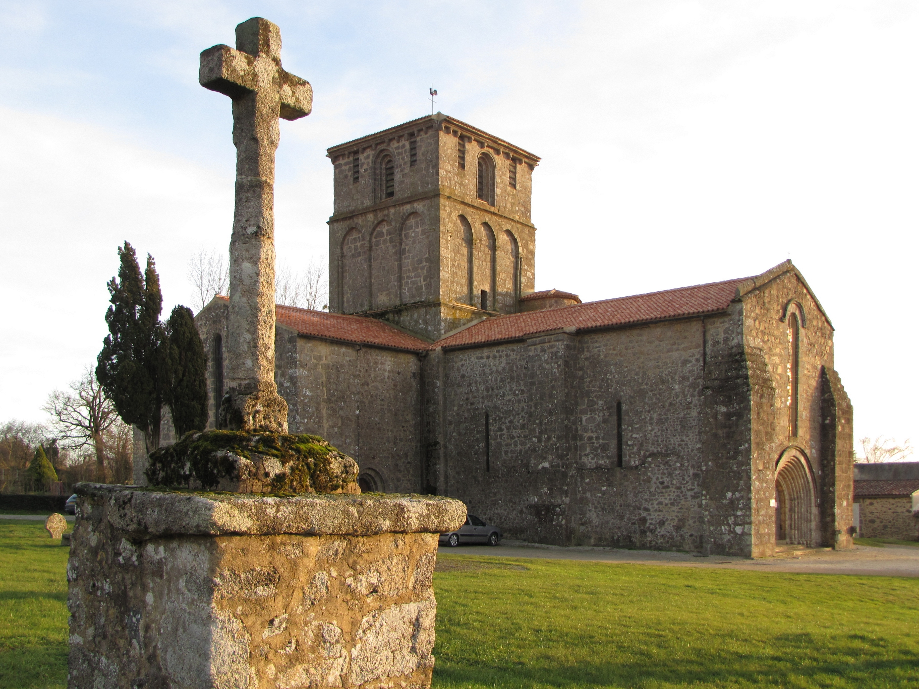 Église Notre-Dame du Vieux-Pouzauges, (Classé, 1939) .